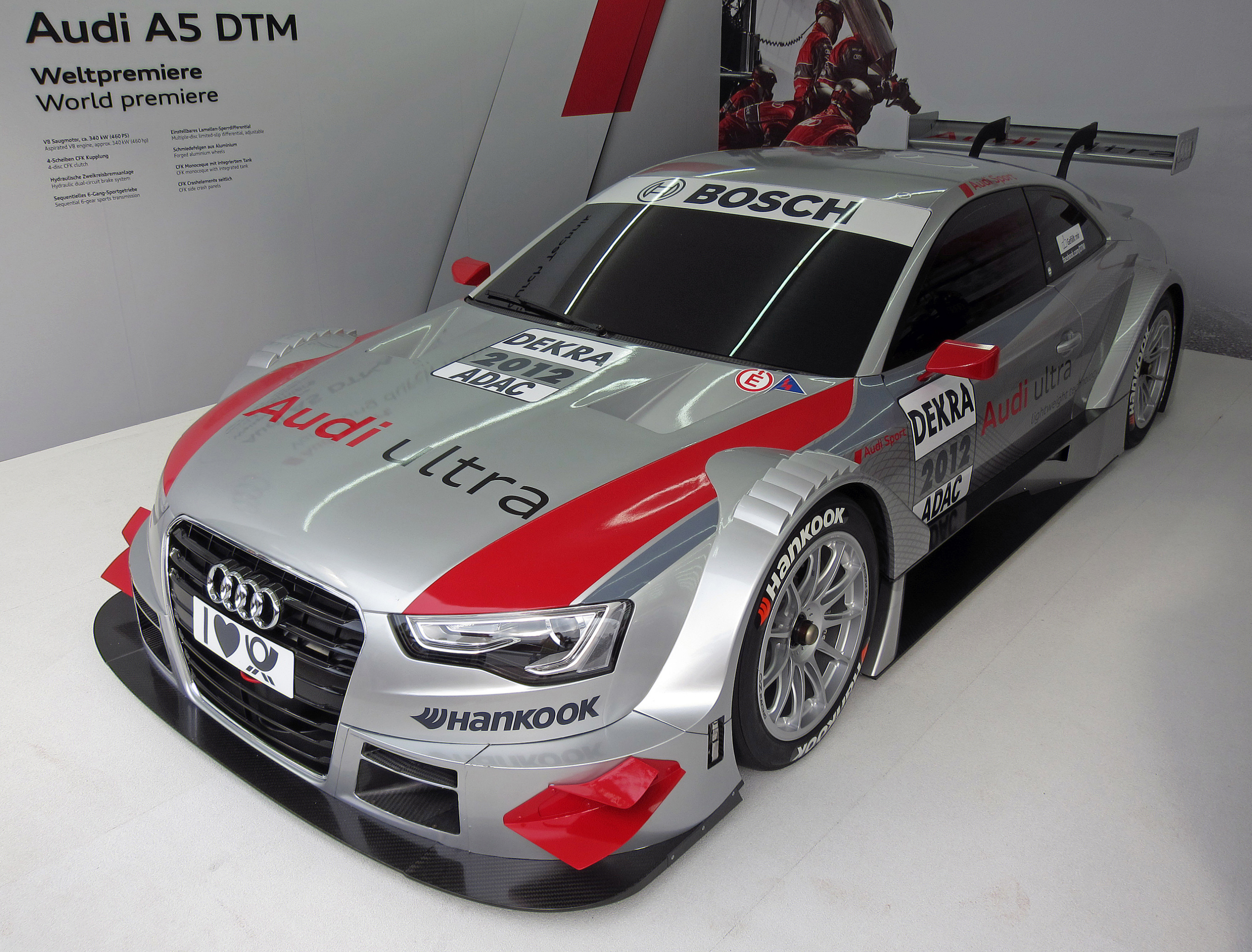 Audi A5 DTM auf der Internationalen Automobil-Ausstellung in Frankfurt/Main